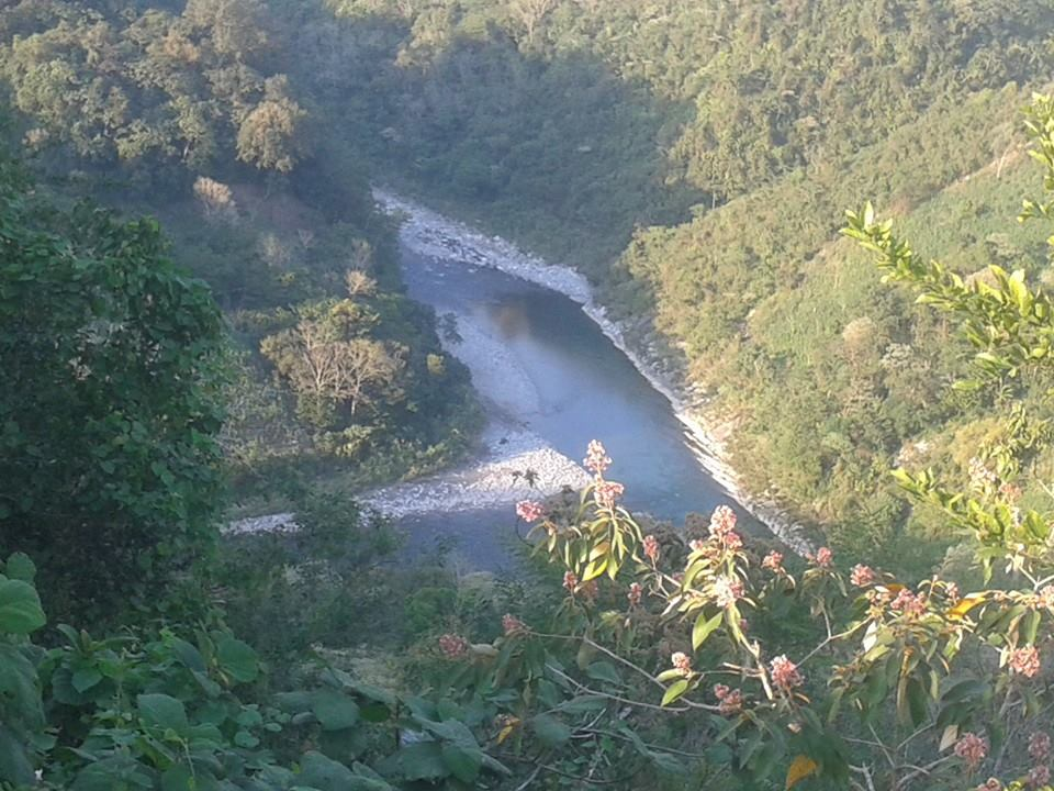 rio ajajalpa